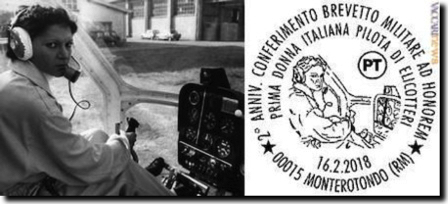 Anullo brevetto pilota Maria Concetta Micheli